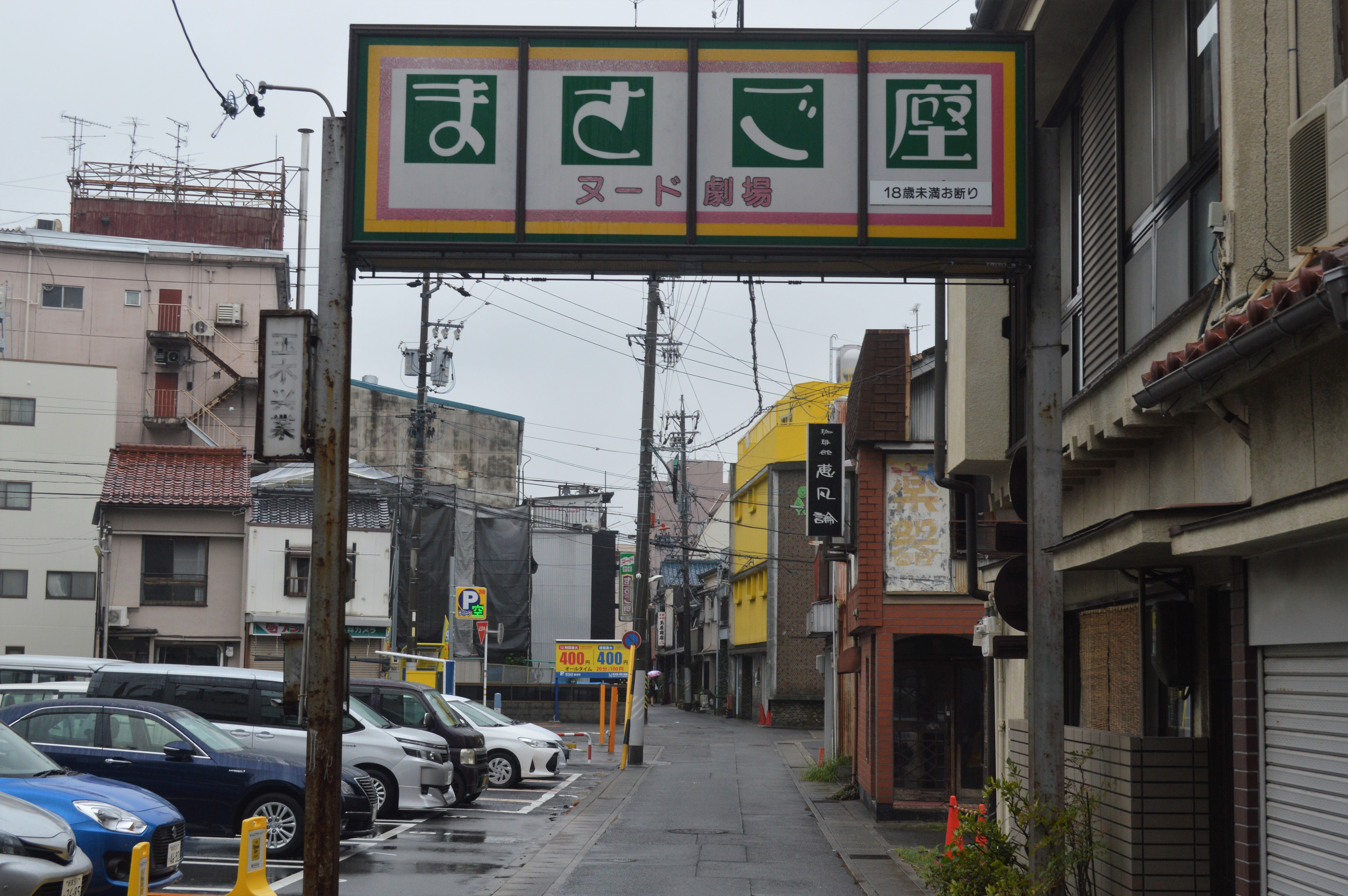 岐阜市のストリップ劇場「まさご座」に至る道路に設置された門。